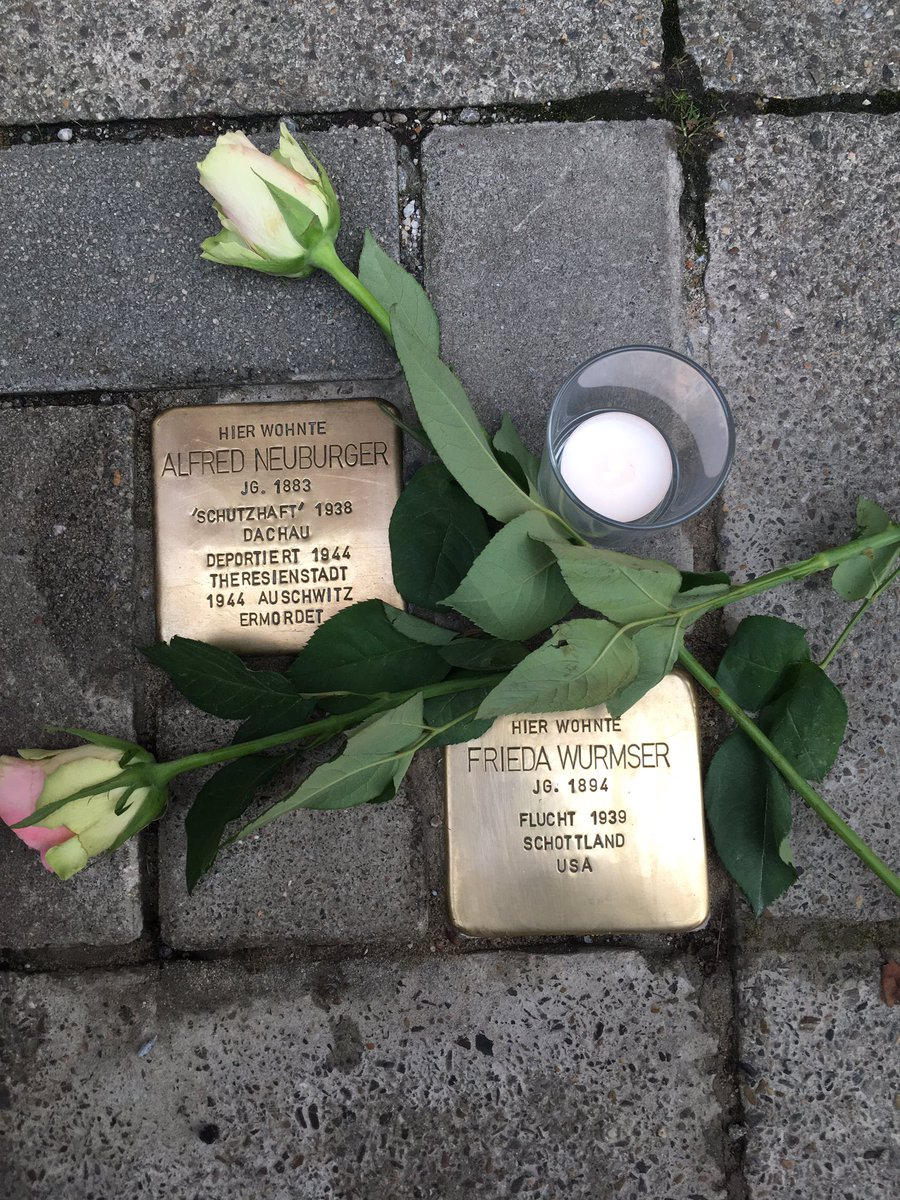 Stolpersteine Neu-Ulm Alfred Neuburger, Frieda Wurmser